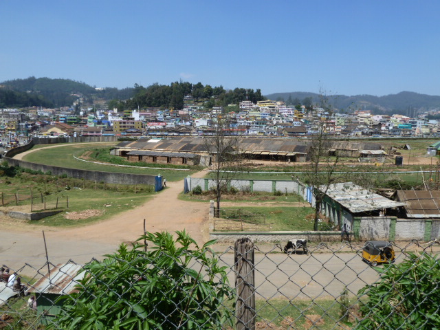 Rennstrecke in Udagamandalam (Ooty), Indien Unknown